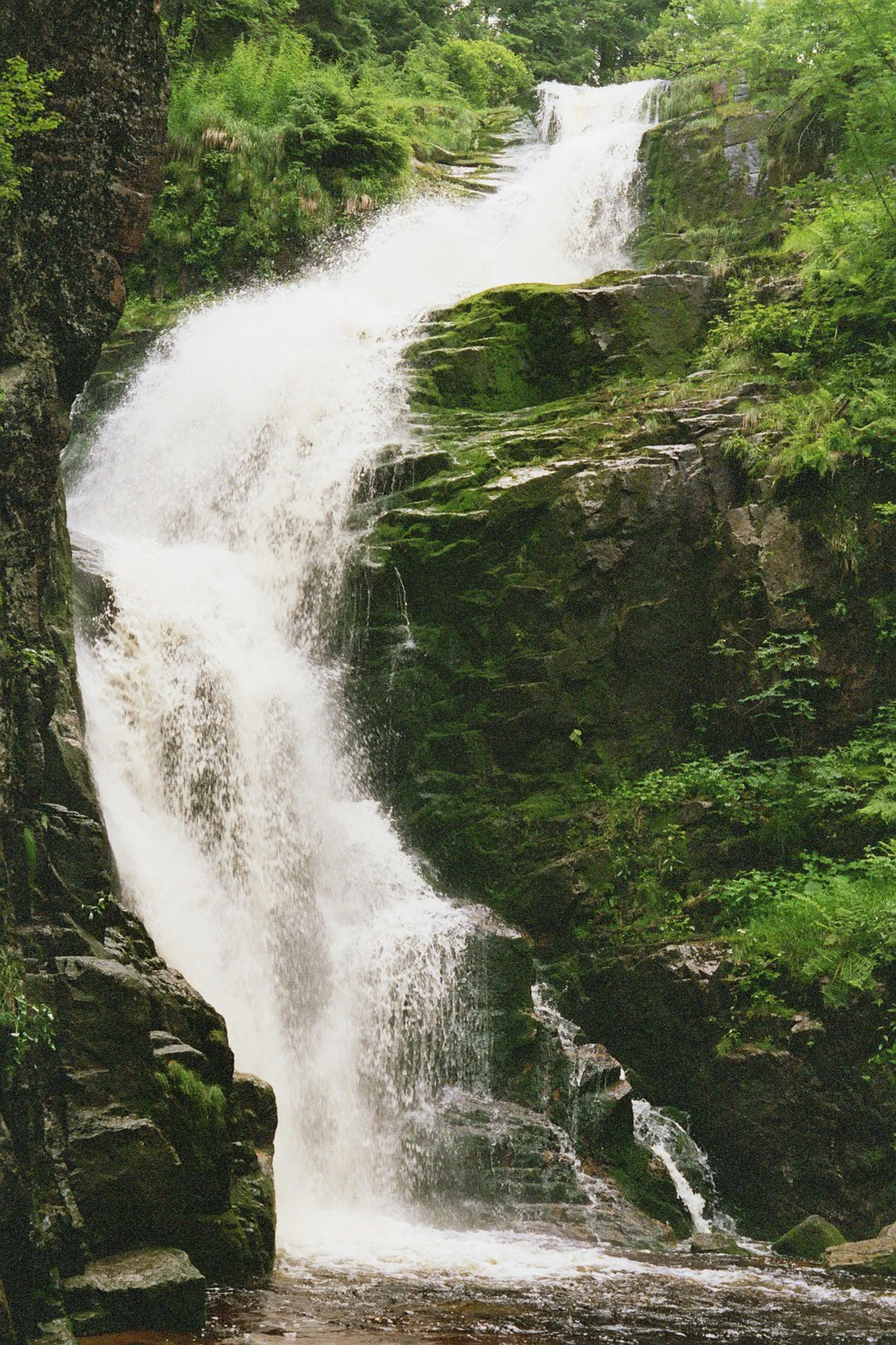 Das Zackerle stürzt rd. 26 m herab. Reifträger, Berg im westlichen Teil des Riesengebirges in Schlesien, aus mächtigen, übereinander gelagerten Granitwänden bestehend, mit einer höheren westlichen Seite, deren kahler Scheitel 1350 m ü. M. liegt, und einer etwas niedrigeren östlichen Kuppe. Westlich von dem R. breitet sich auf der Höhe die Kranichswiese aus, auf der in zahlreichen Quellen das Zackerle entspringt, das nördlich vom R., unterhalb der Neuen Schlesischen Baude, den bekannten, 26 m hohen Zackelfall bildet. (aus Meyers)